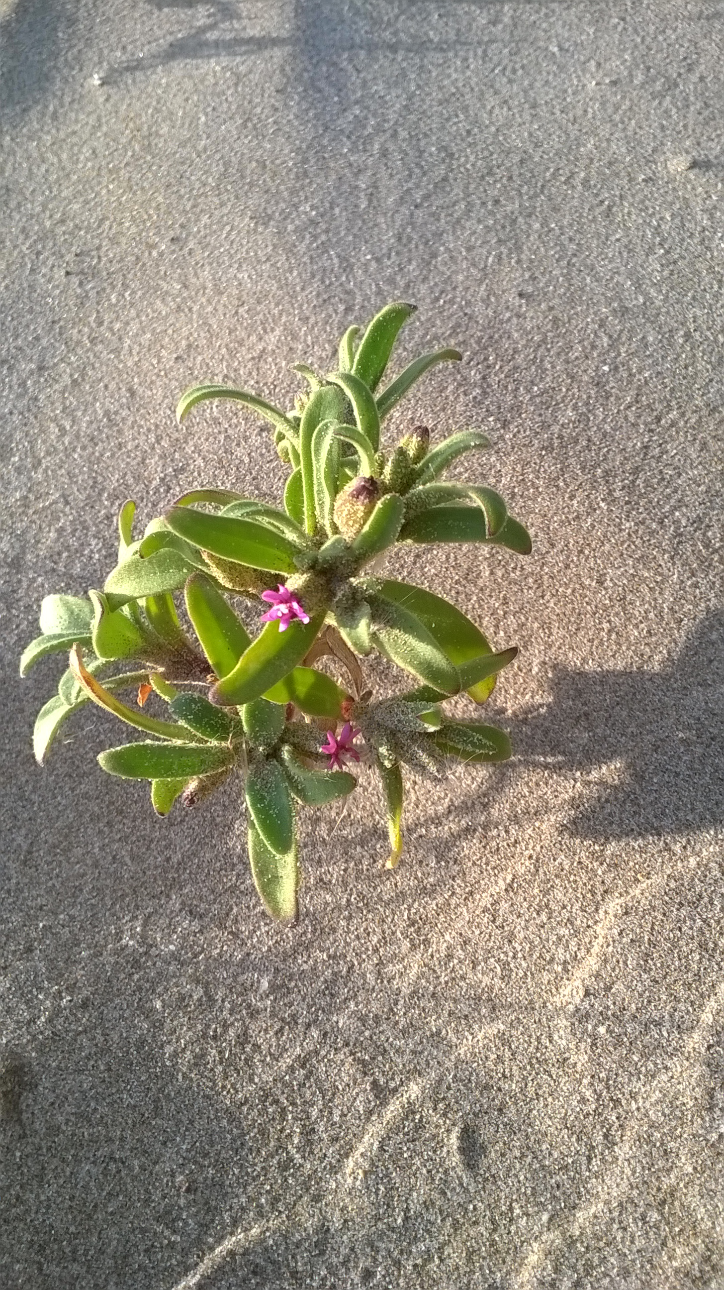 Silene ramosissima en la playa de Puerto Sagunto